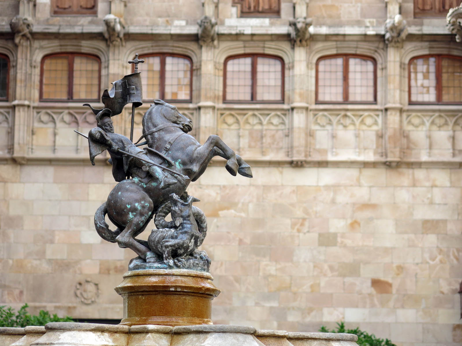 Palau de la Generalitat (Barcelona) Object location41° 22′ 58.01″ N, 2° 10′ 36.01″ E